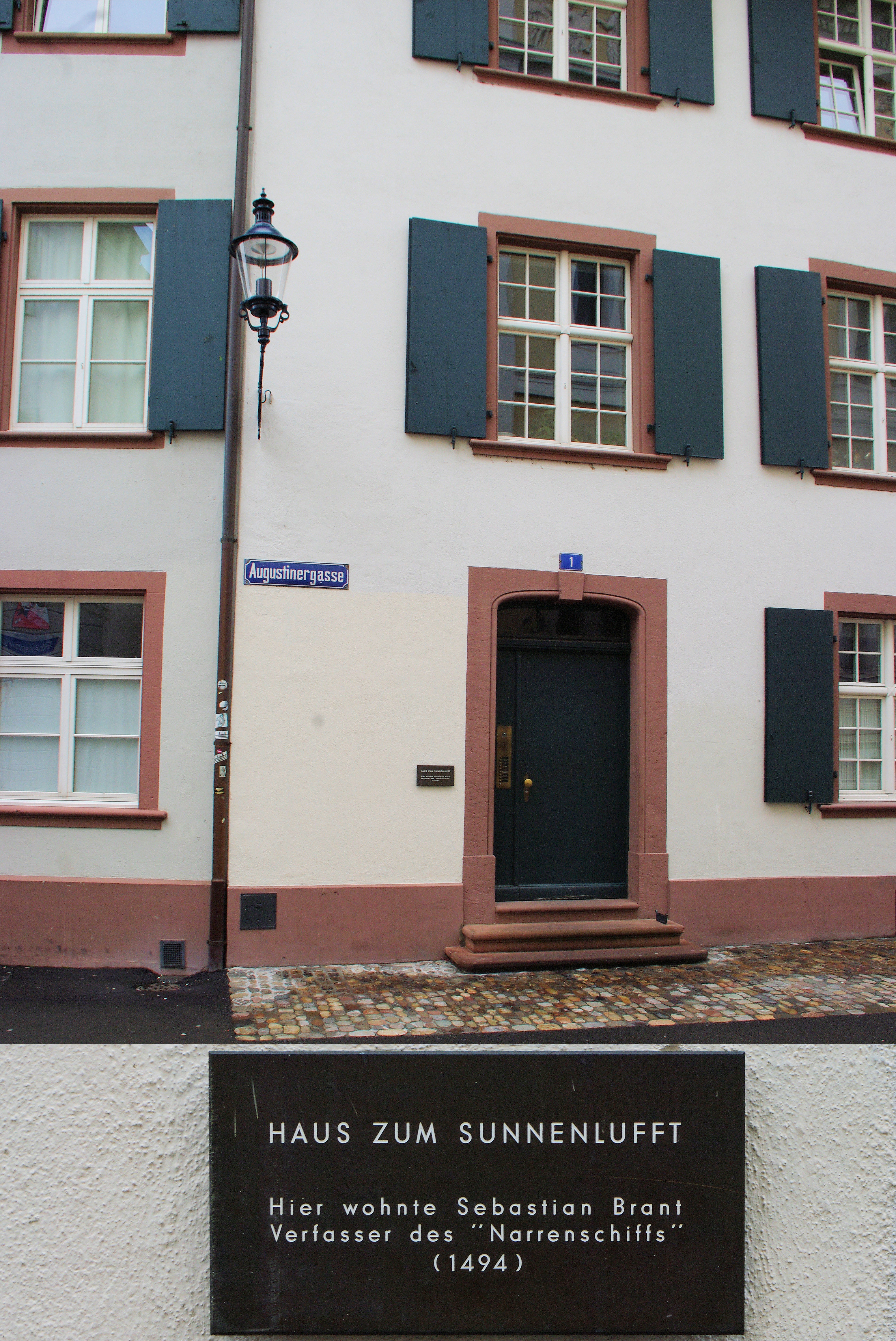 Bilder aus Basel auf dem Weg zum Wikipediatreffen am 28.03.09 Das Haus zum "Sunnenluft" in der Augustinergasse 1 Hier hat Sebastian Brant ( "Das Narrenschiff") 1494 gewohnt